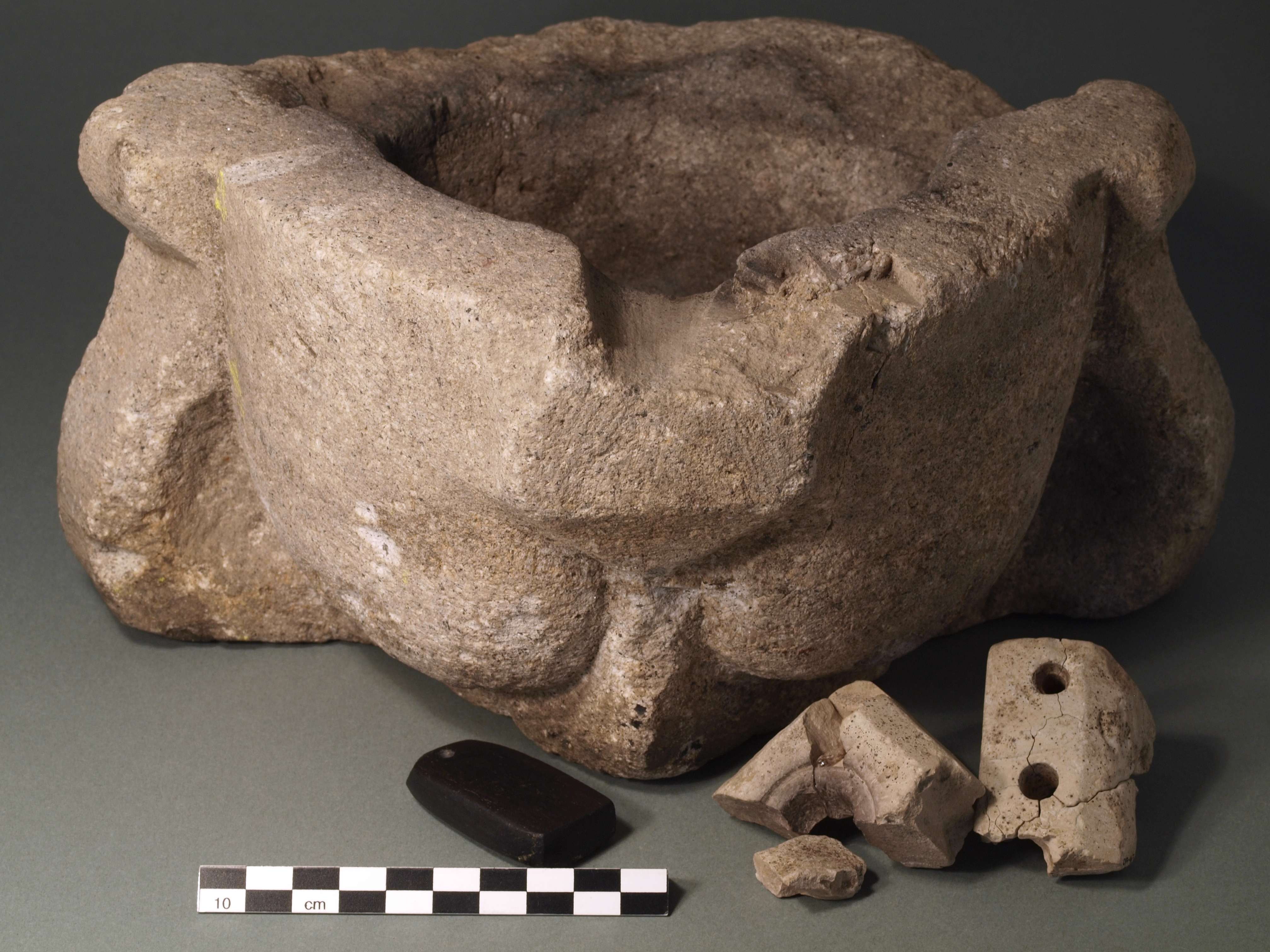 Die Unternsilien eines Goldschmieds, gefunden in der Archäologischen Zone Köln